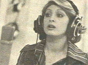 مرجان، خواننده ایرانی برگرفته از